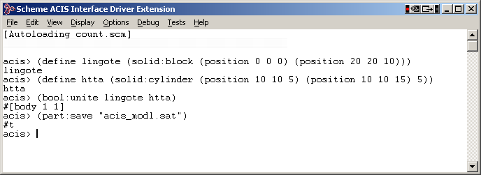 Ambiente de trabajo de ACIS en Scheme